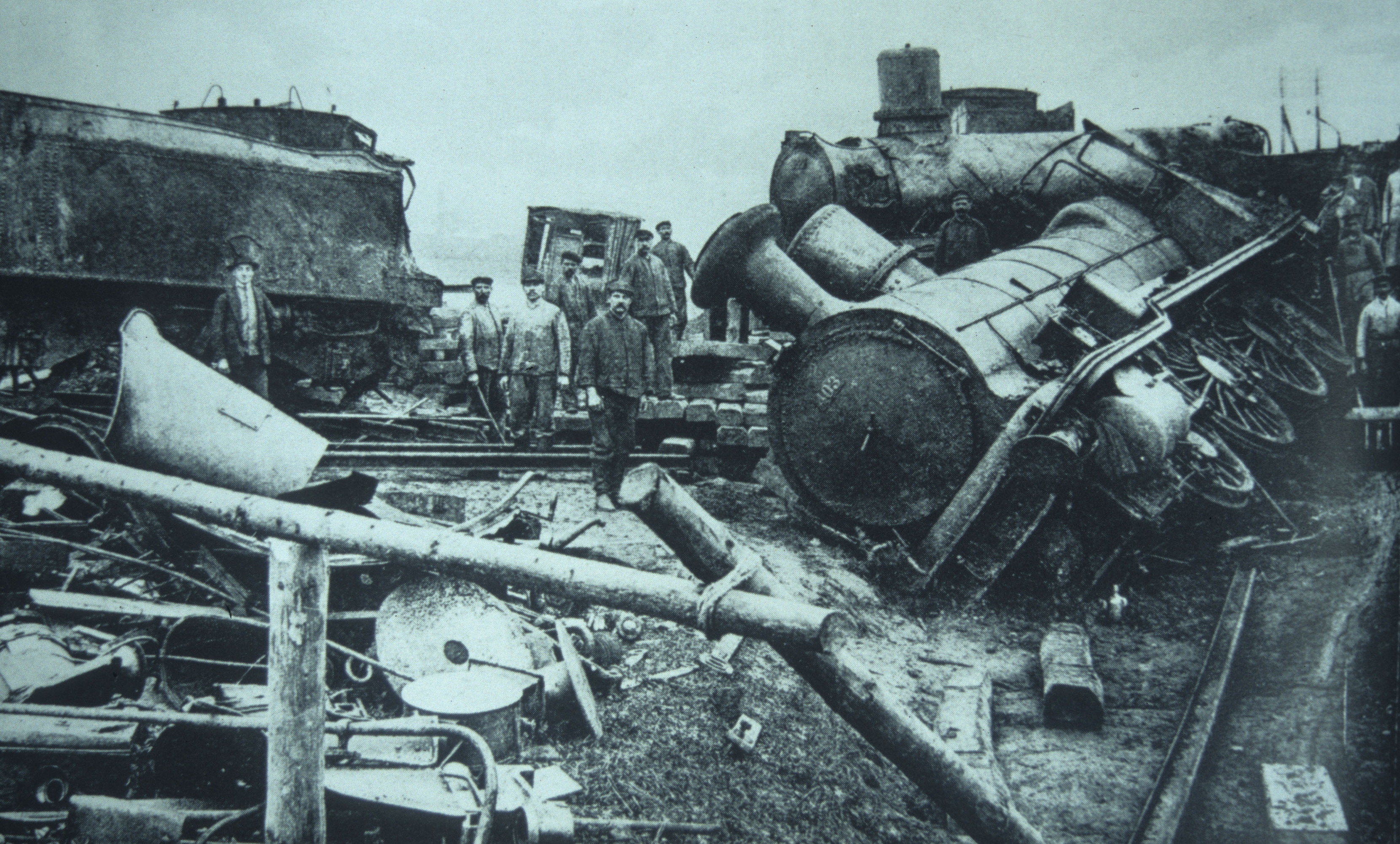 PL 723 DK 69-38 Nachlass Hans Noller: Sammlung zum Eisenbahnwesen in Württemberg / Ca. 1844-2011